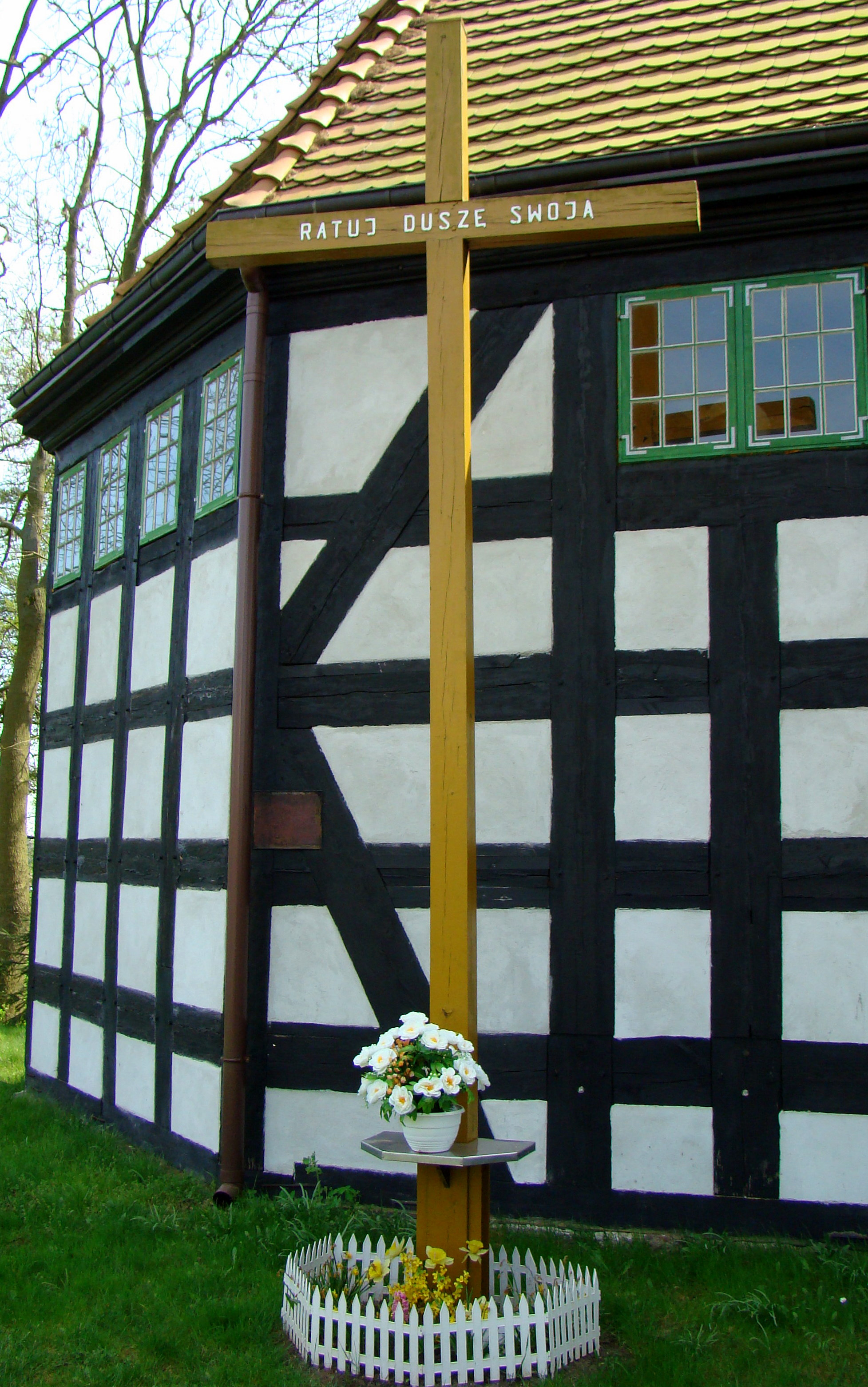 Kościół p.w. Św. Pawła w Tatyni, krzyż przykościelny, (Gmina Police, Powiat policki, Województwo zachodniopomorskie), Polska